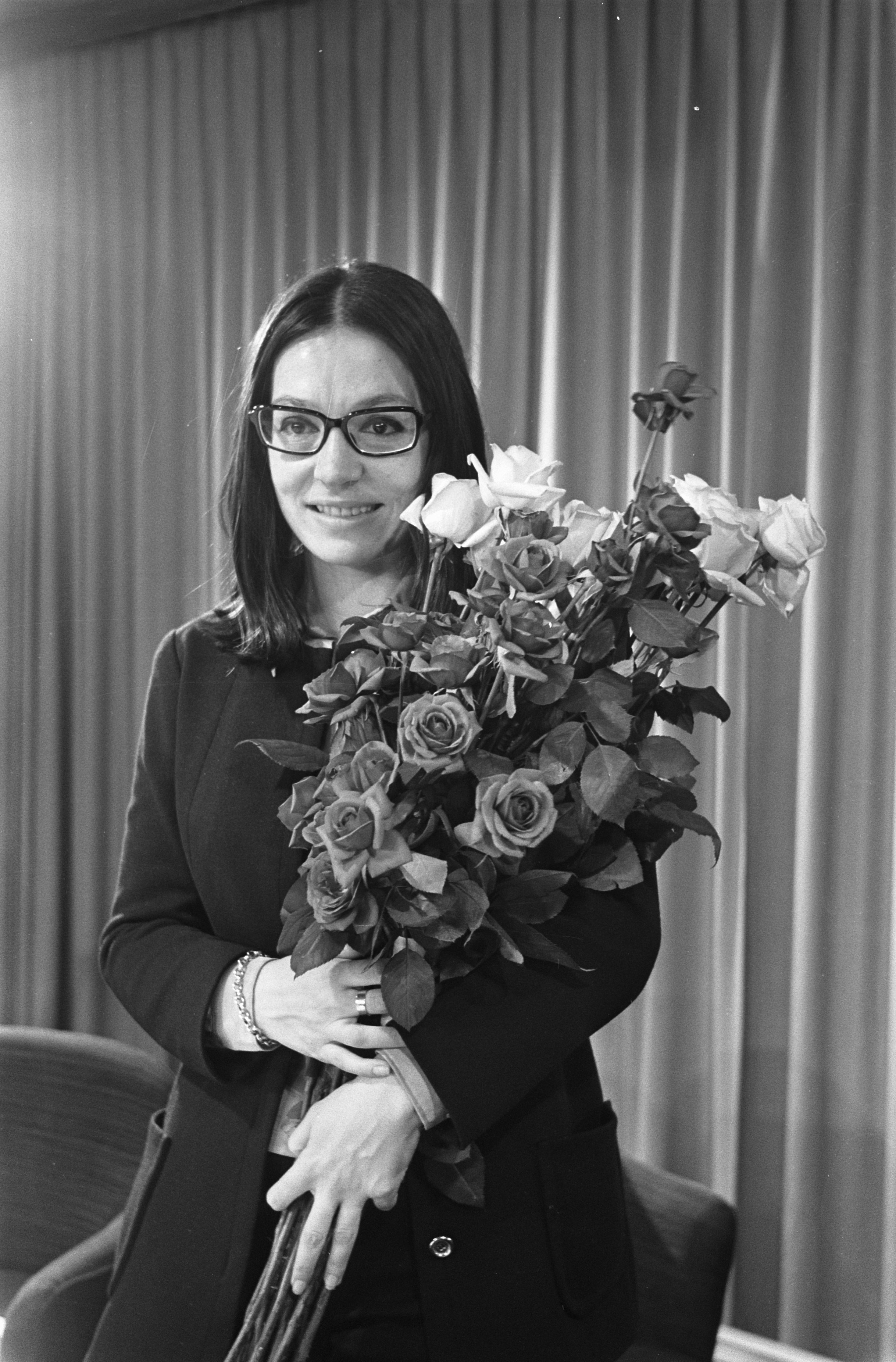 Collectie / Archief : Fotocollectie Anefo Reportage / Serie : [ onbekend ] Beschrijving : Grieks Franse zangeres Nana Mouskouri met echtgenoot George Petsilas op Schiphol Nana Mouskouri Datum : 30 mei 1969 Trefwoorden : zangeressen Persoonsnaam : Mouskouri, Nana Fotograaf : Evers, Joost / Anefo Auteursrechthebbende : Nationaal Archief Materiaalsoort : Negatief (zwart/wit) Nummer archiefinventaris : bekijk toegang 2.24.01.05 Bestanddeelnummer : 922-4744